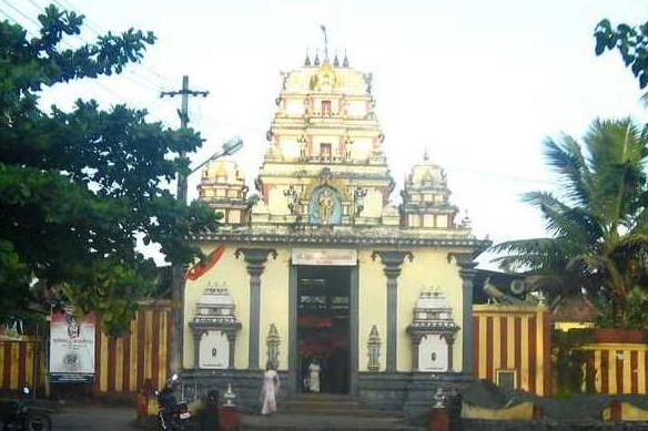 പെരുന്ന സുബ്രമണ്യസ്വാമി ക്ഷേത്രം‌